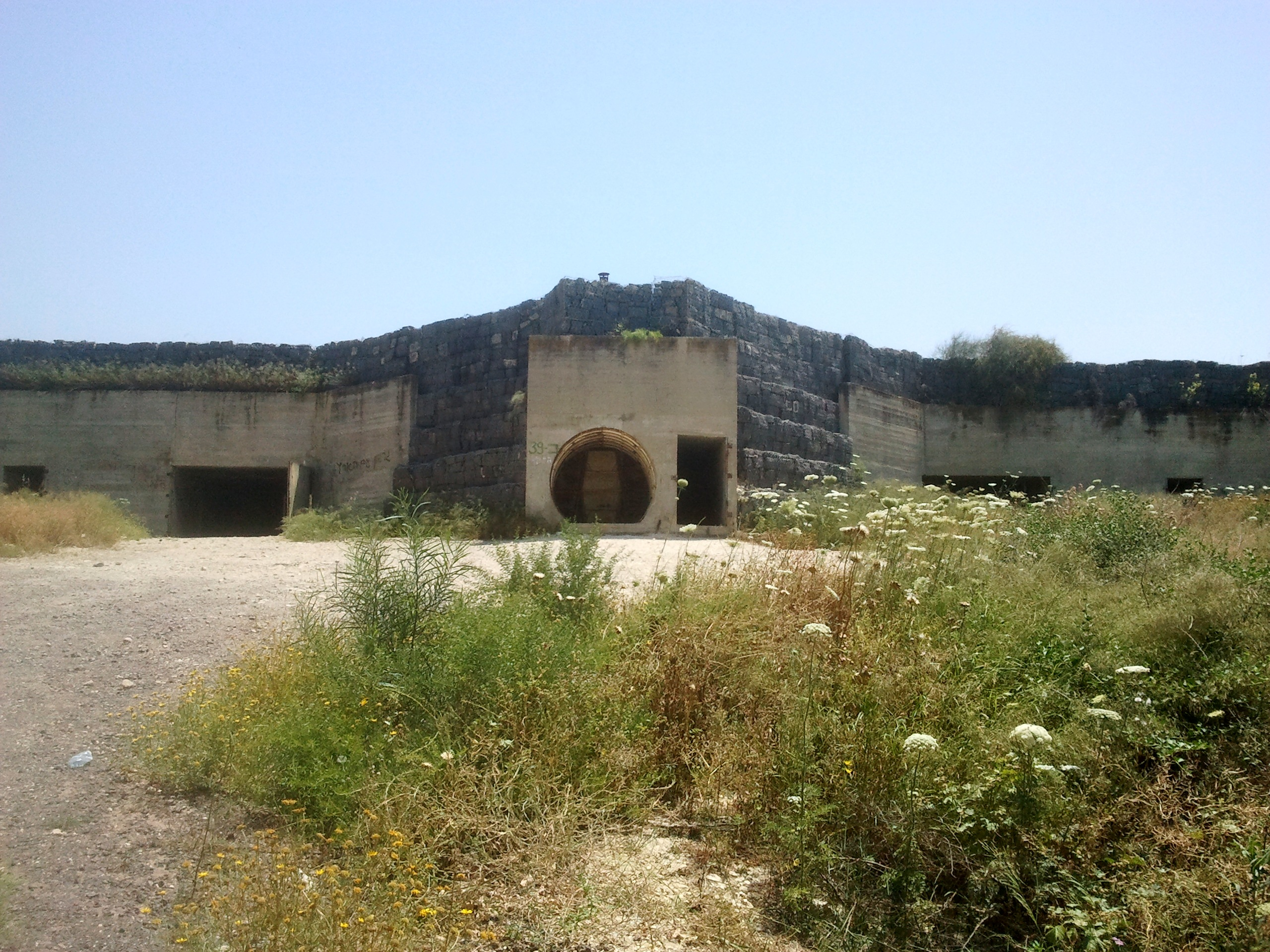 בונקר בטון גדול במוצב שהקים צה"ל בשנות השבעים של המאה העשרים והציב בו תותחים אשר כוונו דרומה לעבר הגלעד המילואימניקים קראו לו תותחי נברון נמצא ליד עין עקוב ביער מבוא חמה